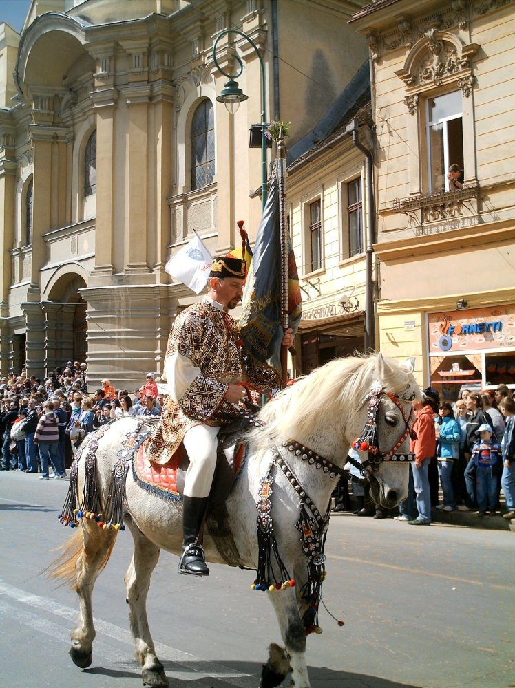 Junii Roşiori - stegarul